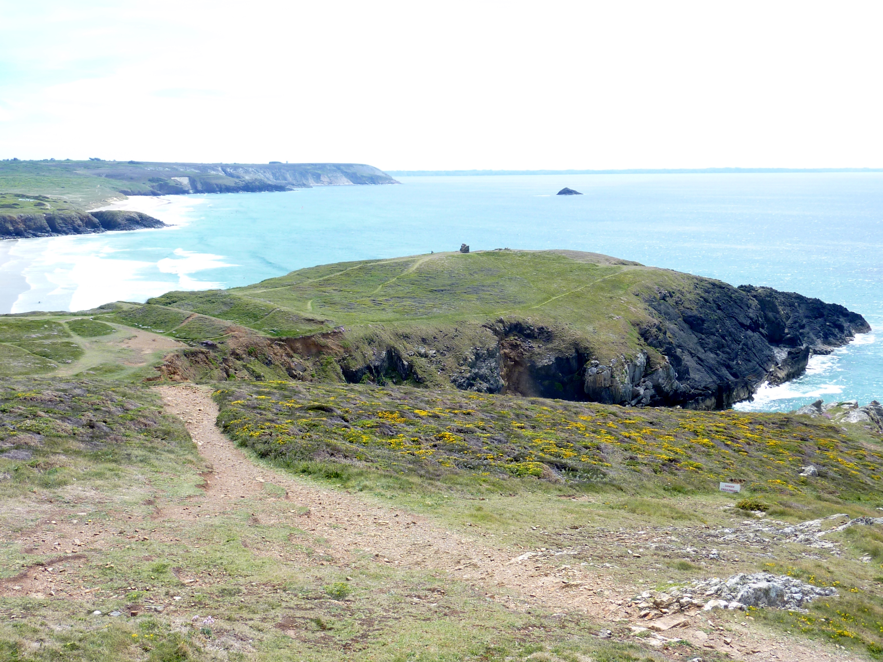 Crozon : l'éperon barré de Lostmarc'h